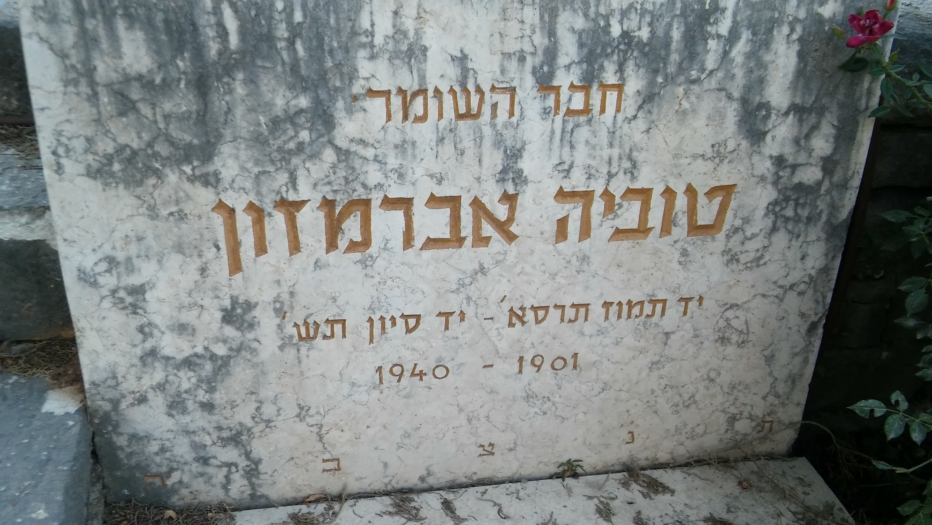 הקבר של טוביה אברמסון בחלקת השומר בבית הקברות בכפר גלעדי